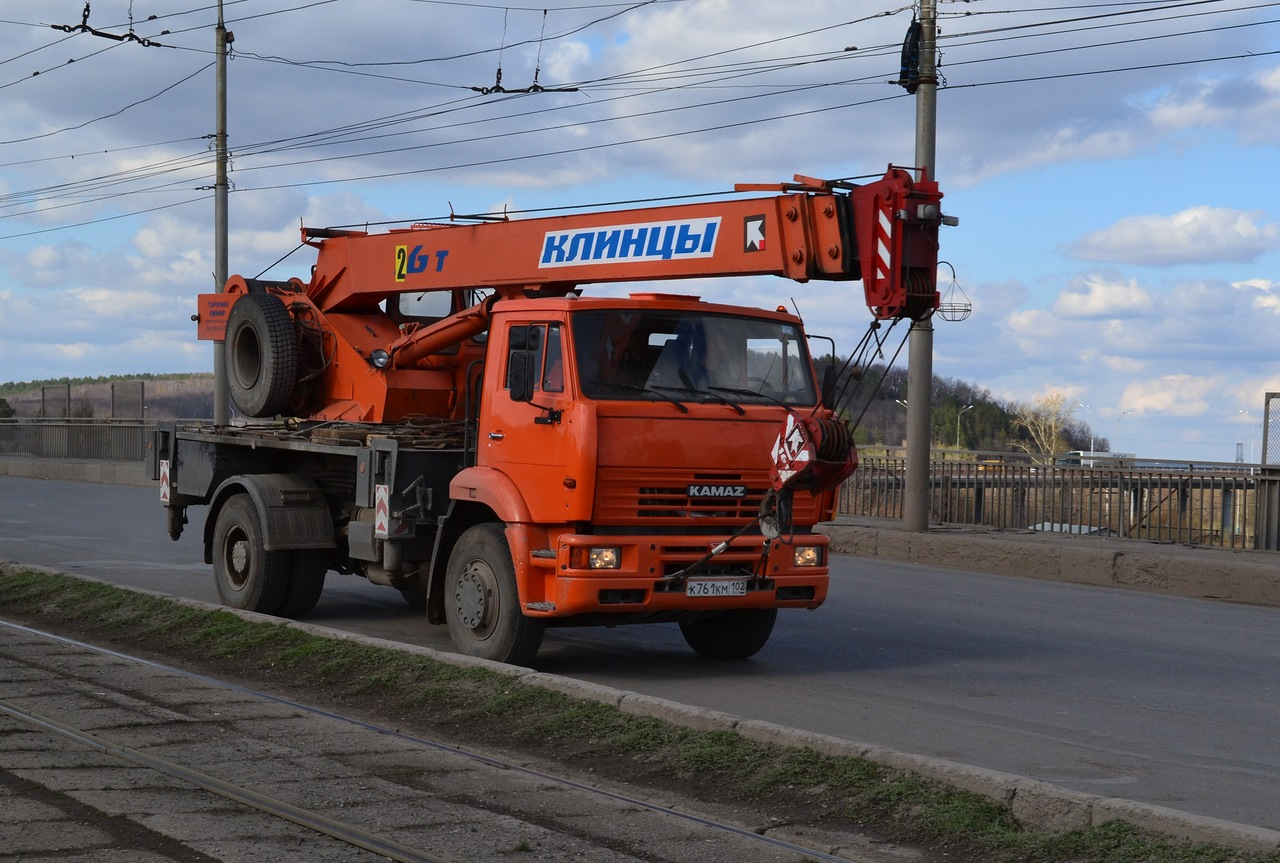 КС 45719-8А «Клинцы» на шасси КамАЗ 53605